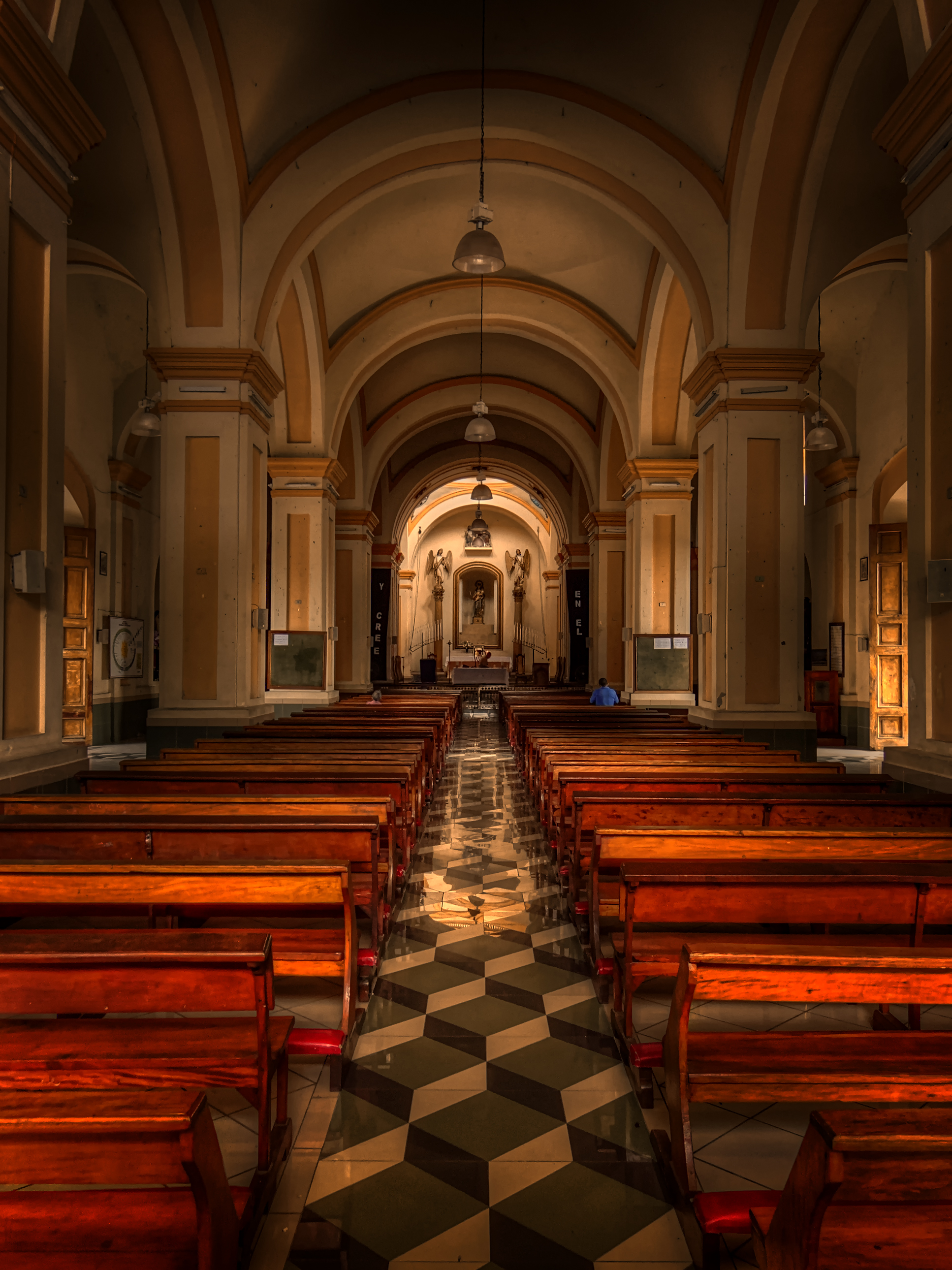 Interior de la Catedral de Sonsonate